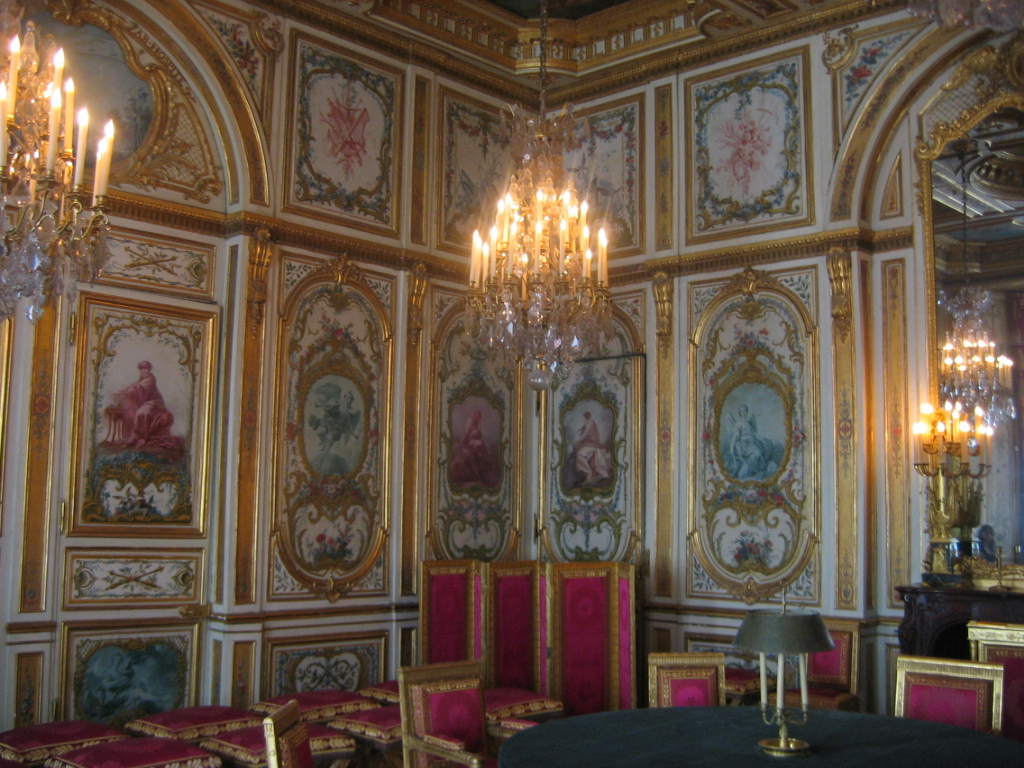 La salle du conseil au château de Fontainebleau (XVIIIe siècle)